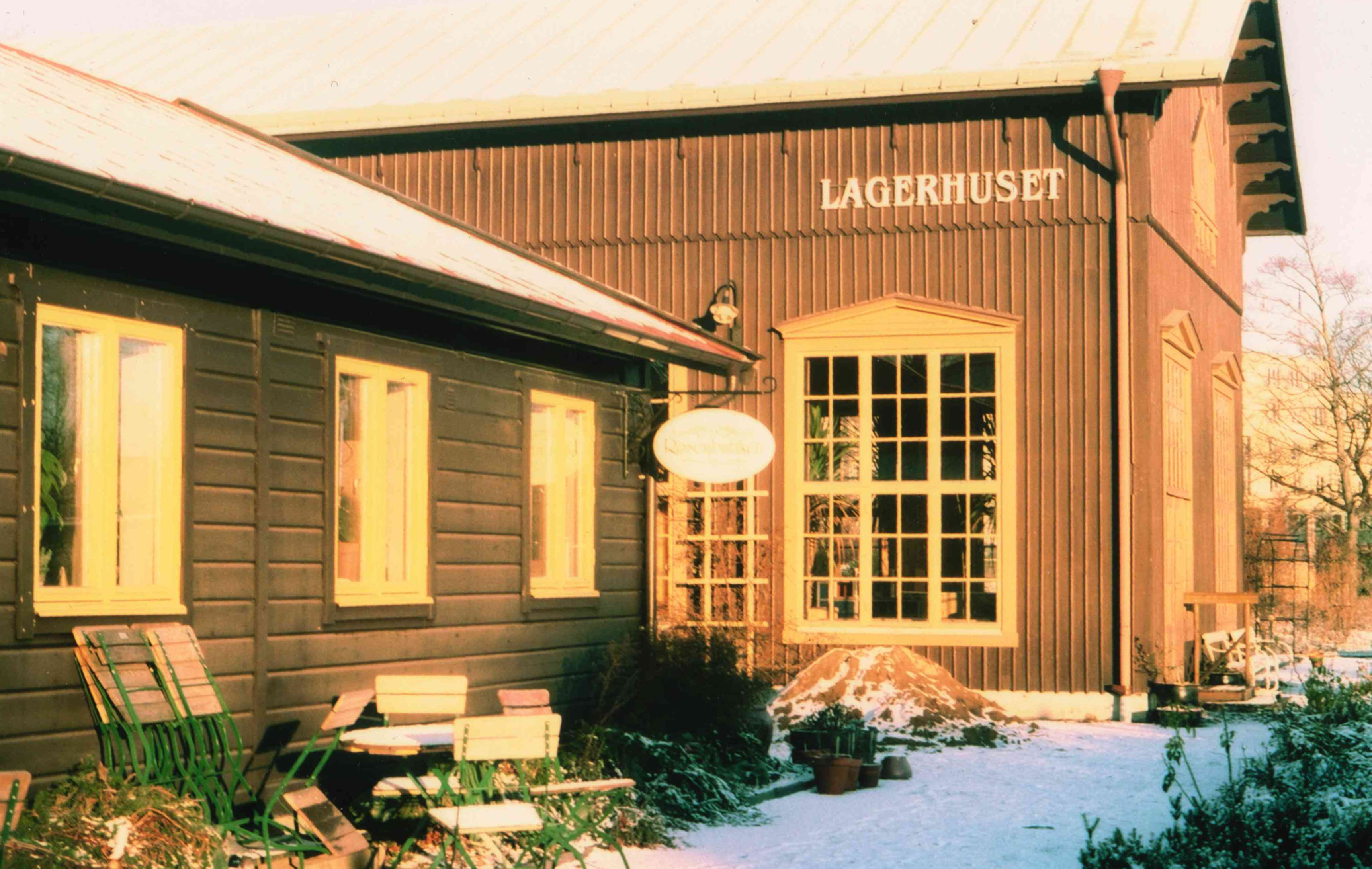 Trägårn 1998 (Lagerhuset är fd regementeshus). Huset till vänster är byggt som arbetarlokal (omklädning).